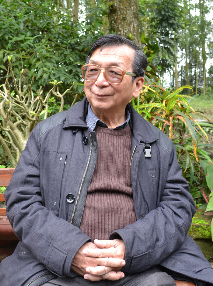 Phó Giáo sư, Tiến sỹ Trần Lâm Biền trong lần khảo sát thực tế tại đền thờ Phúc Khê tướng công Nguyễn Văn Nghi (Thanh Hóa) ngày 25 tháng 3 năm 2014